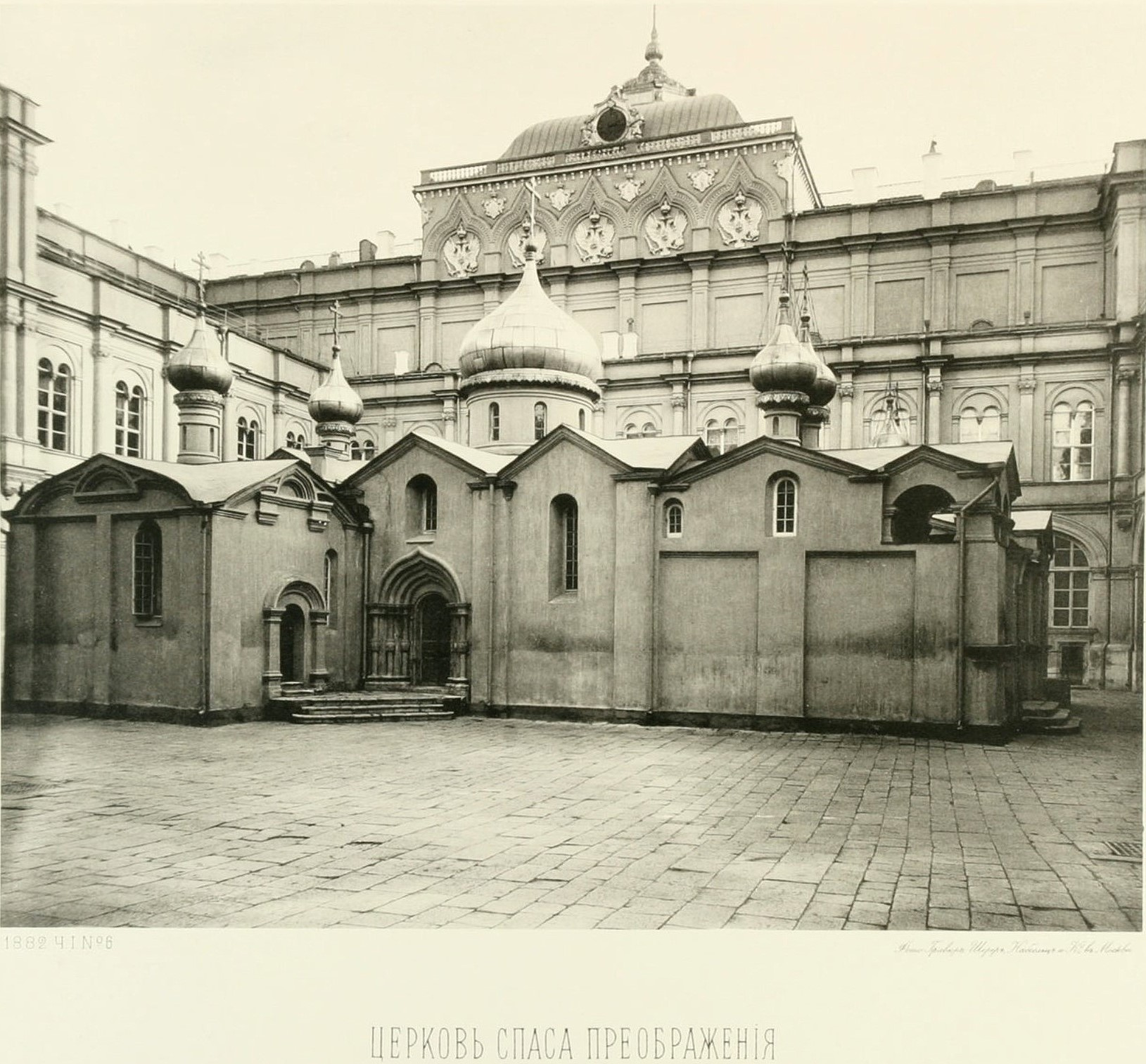 Собор Спаса Преображения на Бору в Московском Кремле